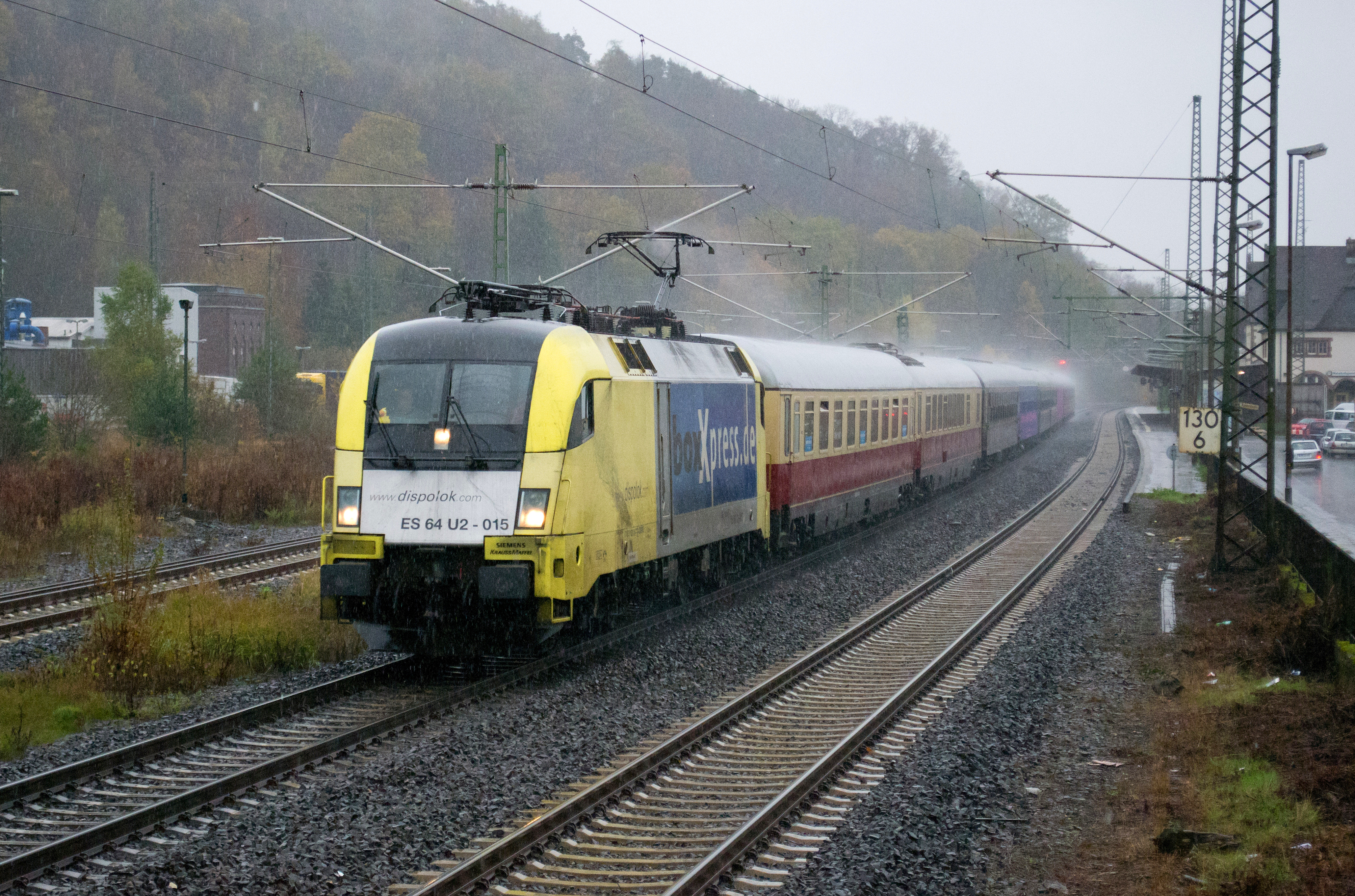 Der Taurus ES 64 U2 - 015 von BoxxPress bespannte am 03. November 2012 einen Fußball-Sonderzug von Stuttgart nach Dortmund. Das Foto entstand in Herborn (Dillkreis).